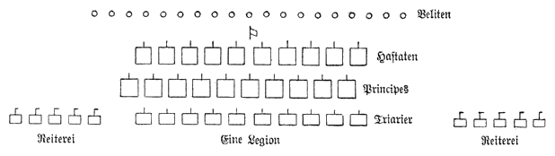 Legionarstellung der Römer. [von oben nach unten:] Veliten Hastaten Principes Triarier Reiterei / Eine Legion / Reiterei